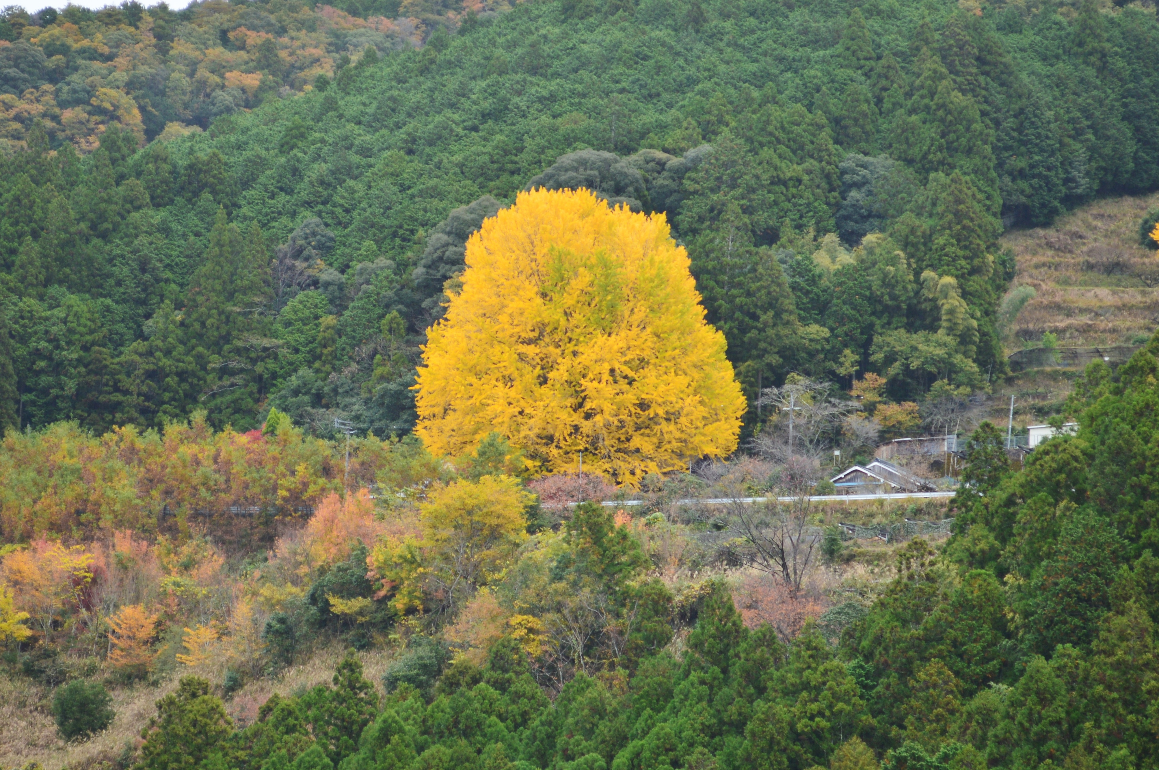 宝泉寺 (田辺市) 福定の大銀杏